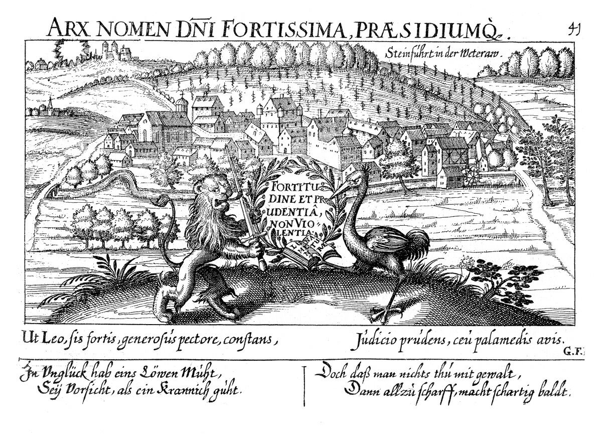 Daniel Meisner/ Eberhard Kieser, Thesaurus Philopoliticus oder Politisches Schatzkästlein Bd. 1, Faksimile-Neudruck der Ausgabe Frankfurt/ Main 1625-1626 u. 1627-1631, Nördlingen 1992, Buch 3, Nr. 40